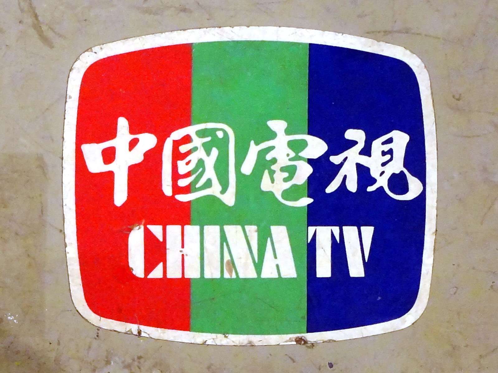 1981年至1991年，中國電視公司使用的Sony手提外景1吋帶錄放影機BVH-500（松山文化創意園區「金鐘五十．響 特別展」展示品）上蓋貼的中國電視公司中英雙語映像管型商標，中文字體採集自孫中山墨寶。